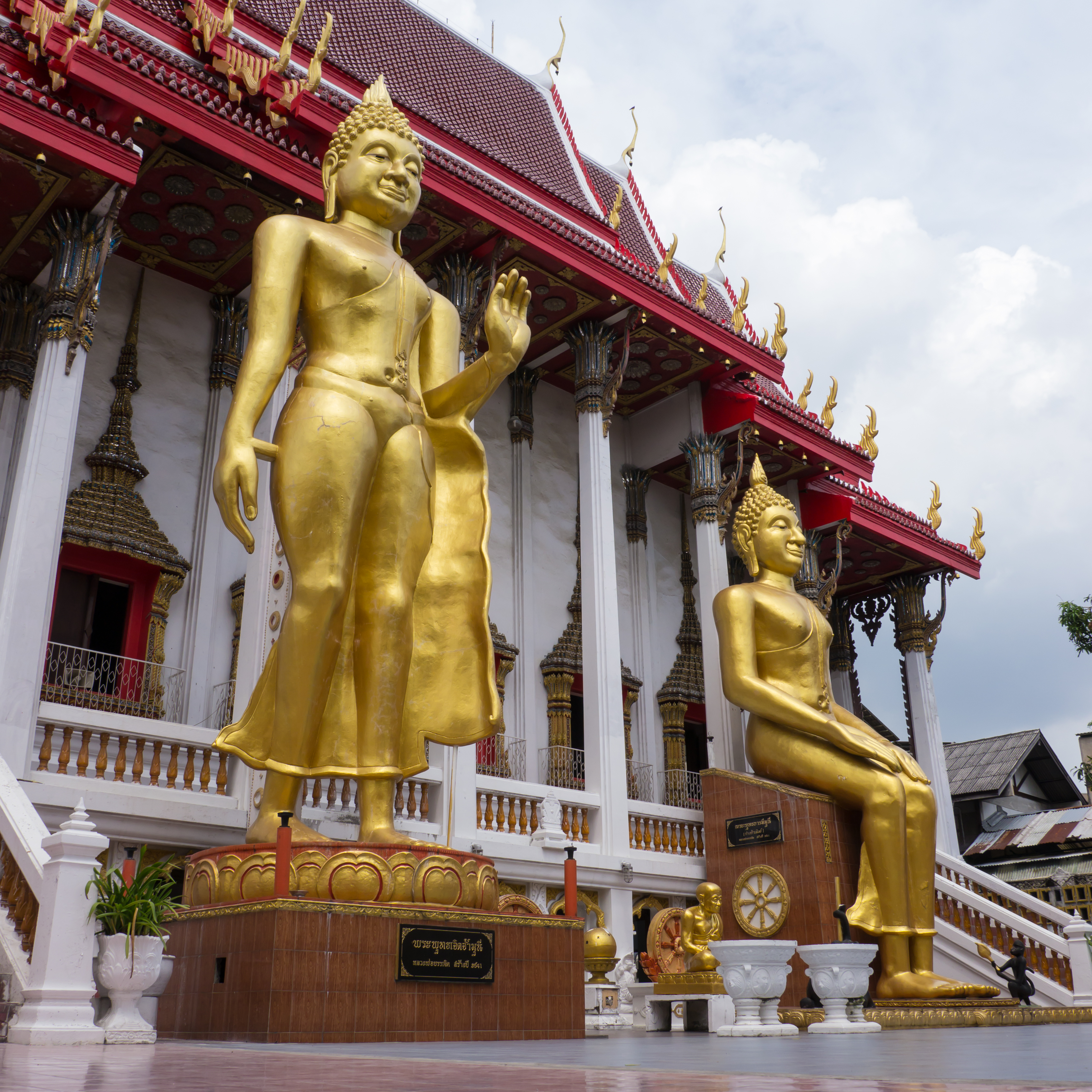 วัดสิตาราม